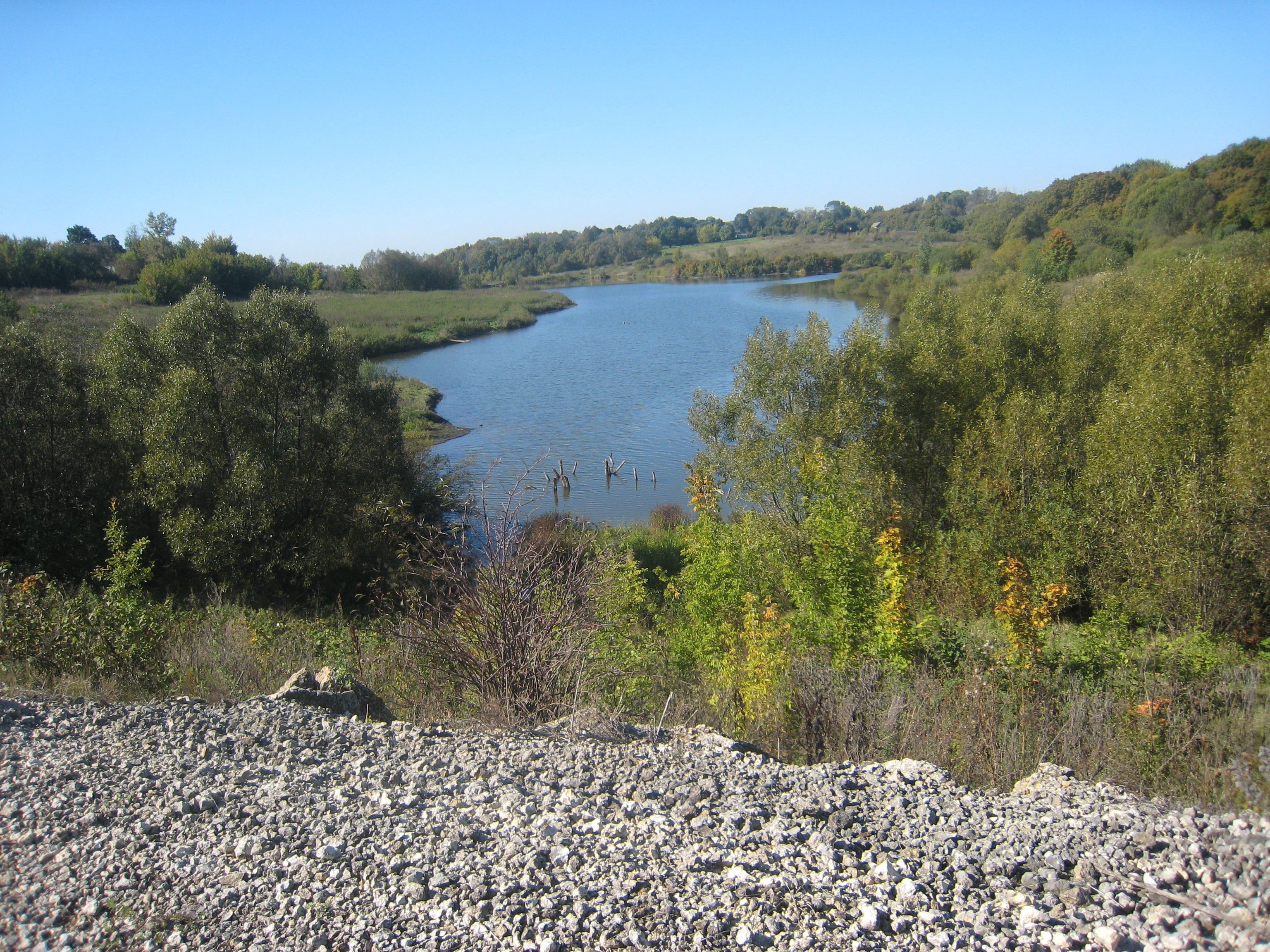 Кладбище в посёлке Скорятино, рядом со станцией Скарятино. Пруд